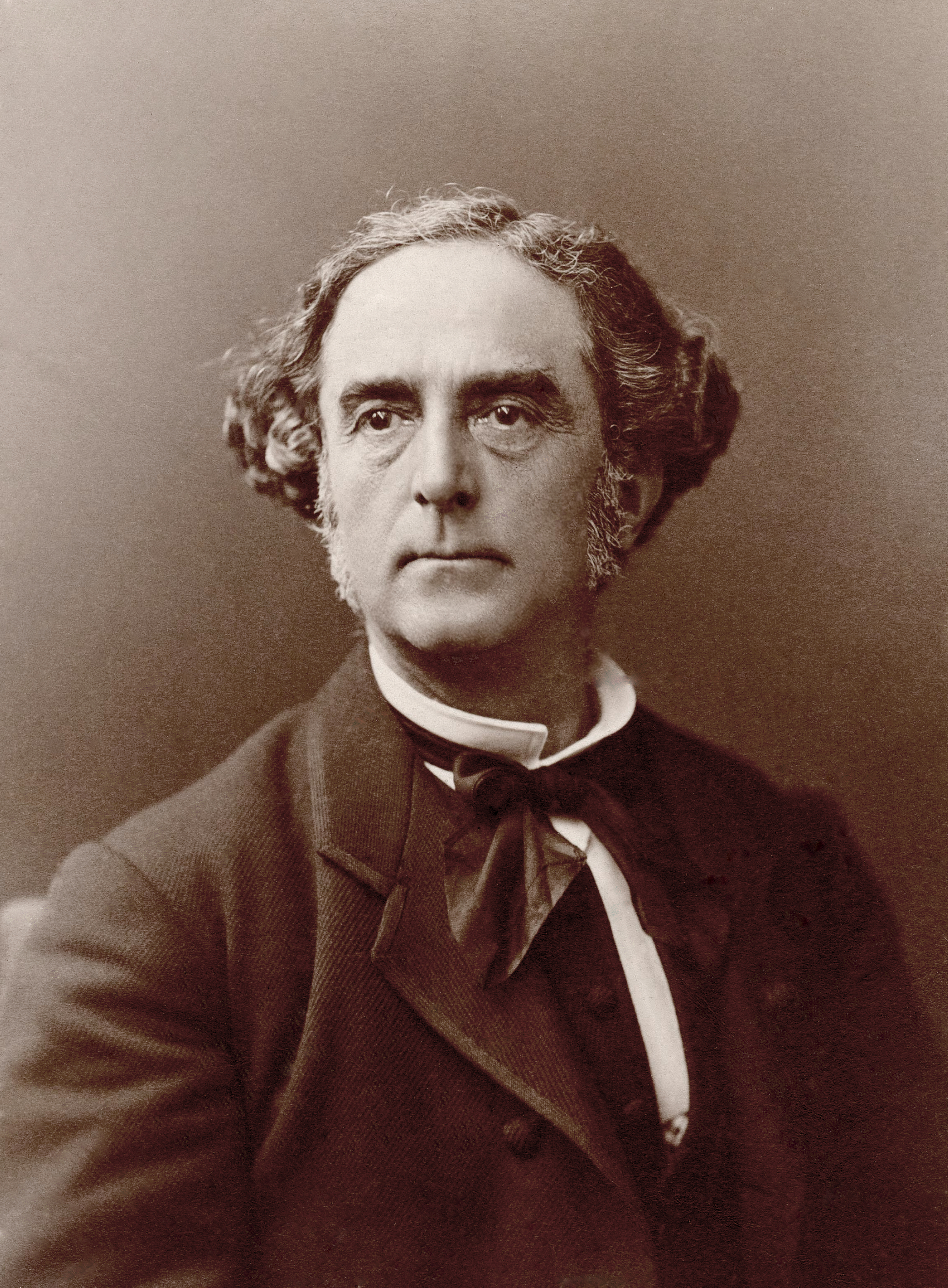 Félix du Temple (1823 - 1890), officier général, parlementaire et pionnier français de l'aéronautique